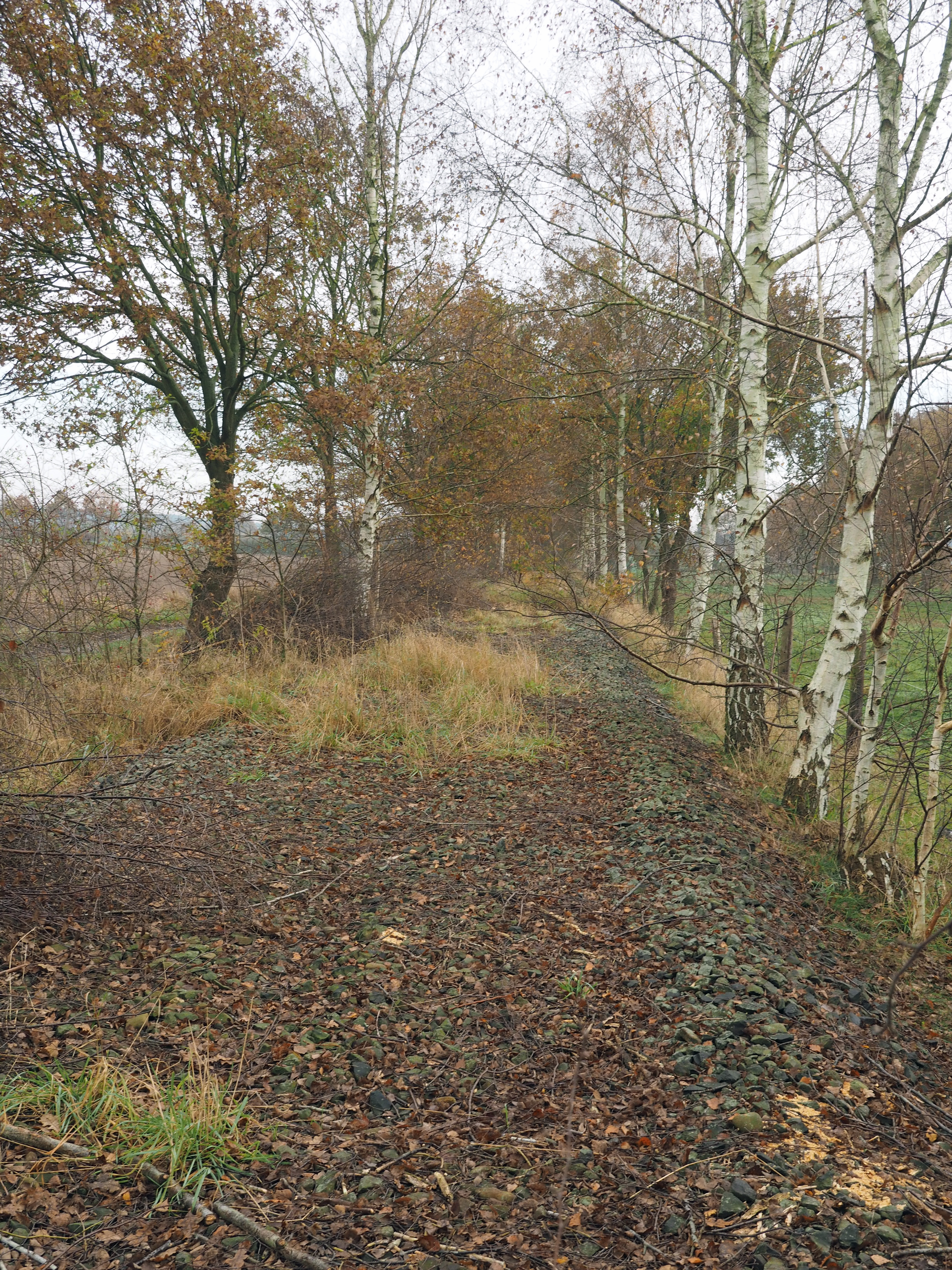 Stillgelegter östlicher Abschnitt der Bahntrasse der Allertalbahn in der Nähe von Bockelskamp